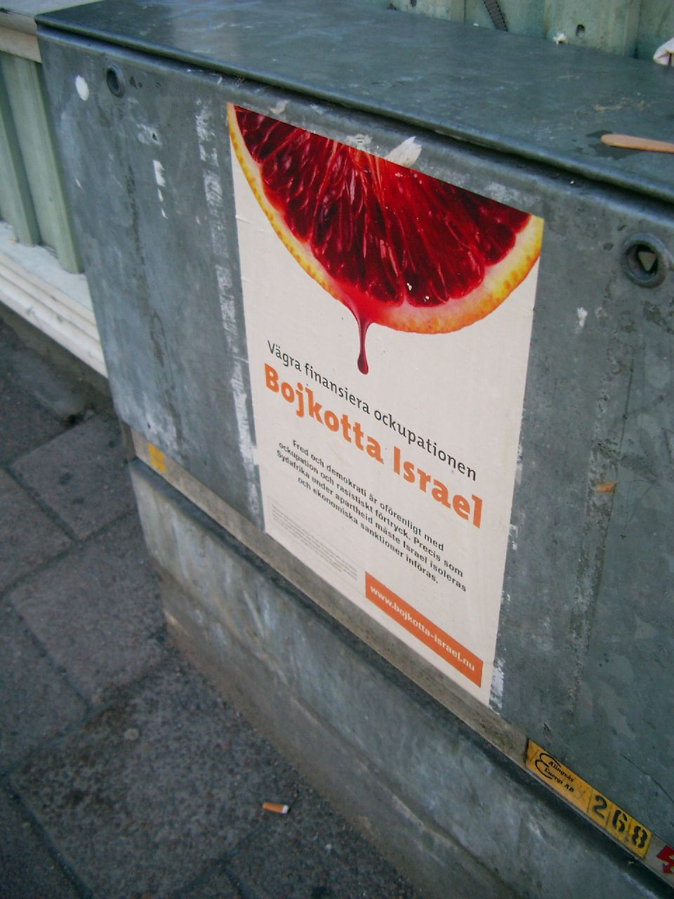 "Rechaza financiar la ocupación, boicot a Israel". Cartel socialista sueco llamando al boicot contra Israel.